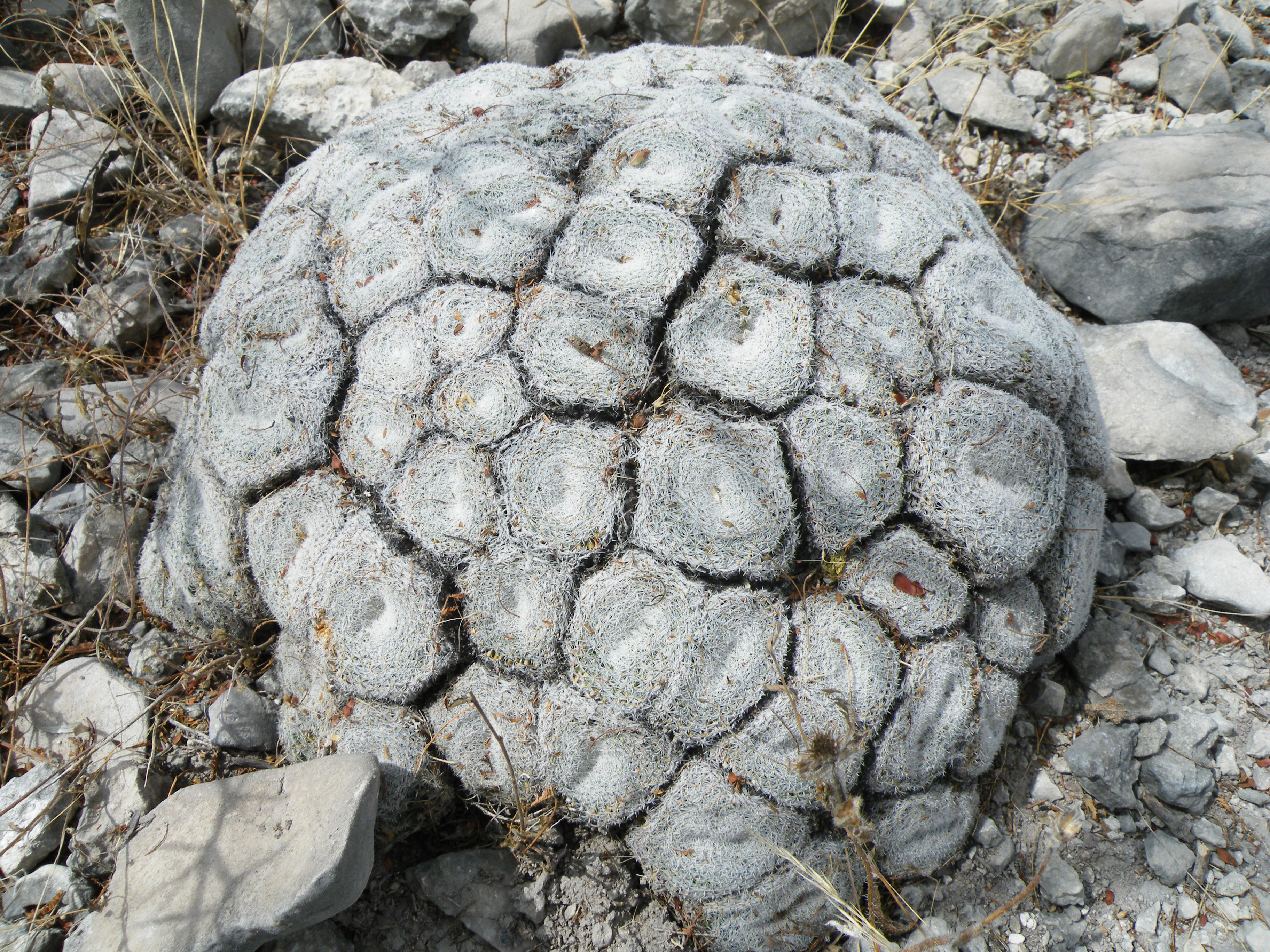 Las Tablas, San Luis Potosis